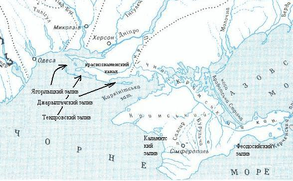 Заливы Черного моря